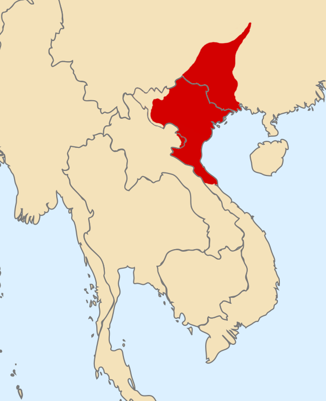 Trong những năm cuối thời thuộc Đường và thời Tự chủ, lãnh thổ Tĩnh Hải quân gồm 12 châu là: Giao Lục Phúc Lộc Phong Thang Trường Chi Vũ Nga Vũ An Ái Hoan Diễn Lãnh thổ 12 châu này bao gồm Bắc Bộ và Bắc Trung Bộ Việt Nam, kéo dài tới phía bắc Hoành Sơn, thêm một phần phía tây nam tỉnh Quảng Tây, Trung Quốc hiện nay. Source